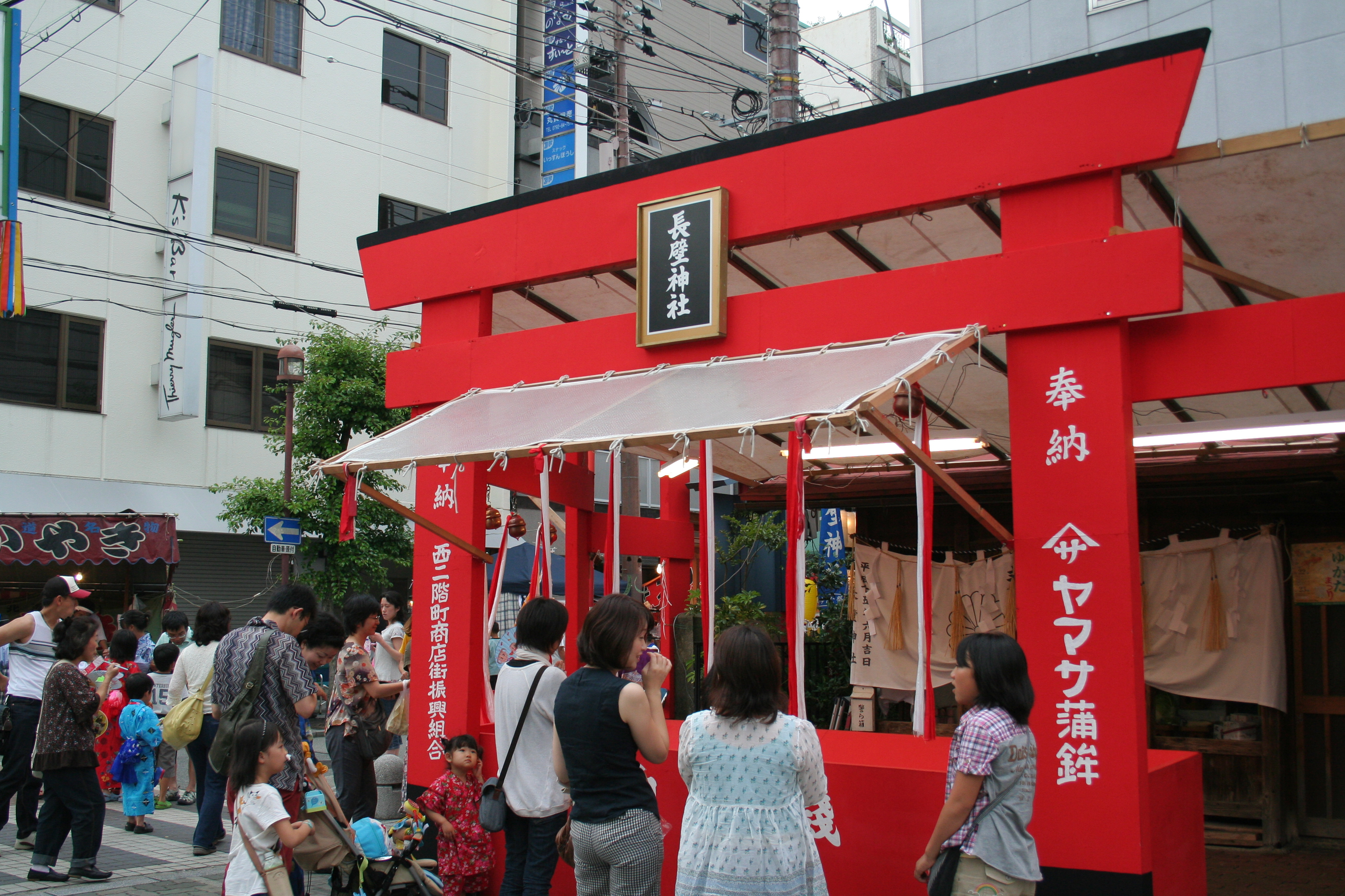 2009年6月22日から23日にかけて、姫路市大手前通りにて開催された「姫路ゆかた祭」。2つ日間にかけて行なわれた祭の風景。長壁神社に参拝する人々。注意:ファイル番号及び日時は時系列順にはなっておりません。また、性別、年齢、国籍などによる分類は推定で行なっております。